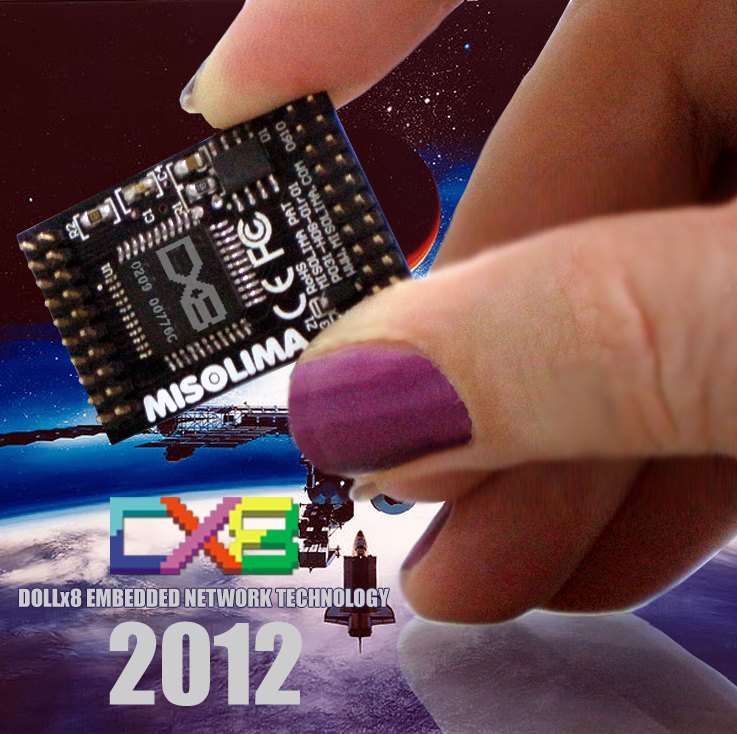 DOLLx8 ePAT MCU